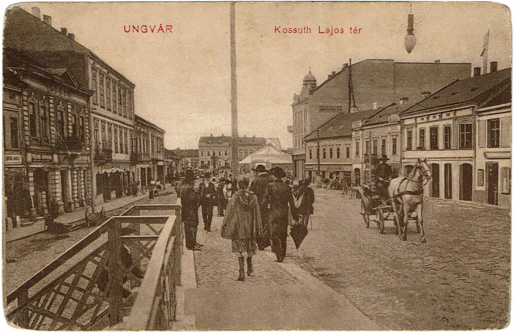 Ортодоксальные евреи в Ужгороде.